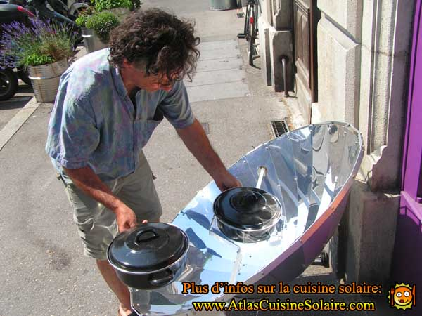 Cuisson solaire.